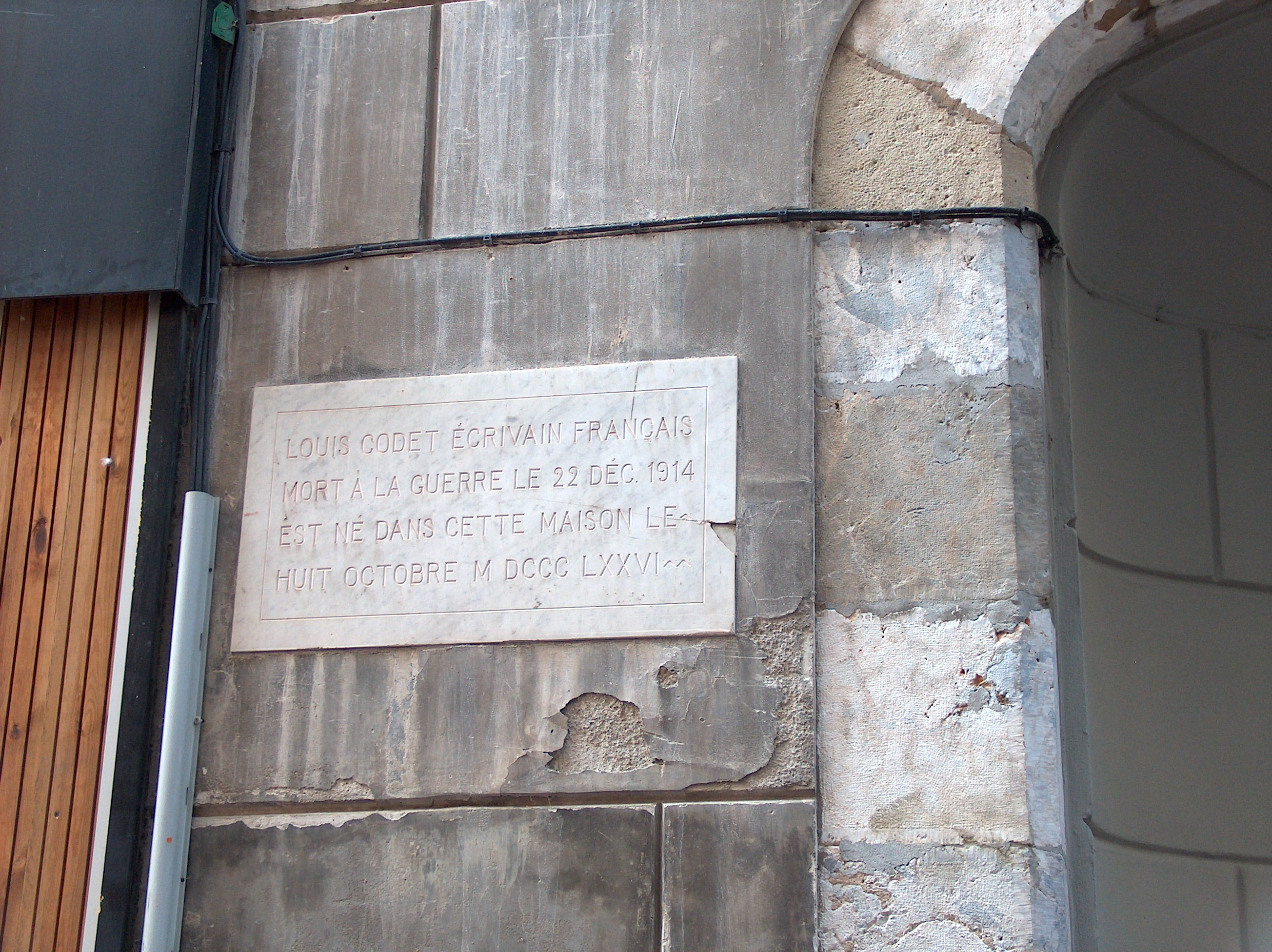 Plaque commémorative. Naissance de cet écrivain le 8 octobre 1876 dans cet immeuble.